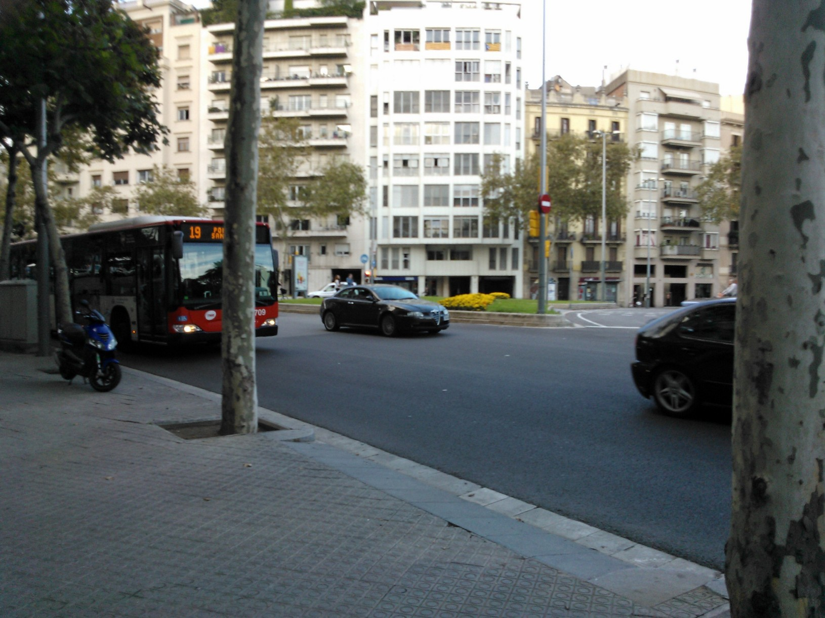 Autobús urbà de Barcelona